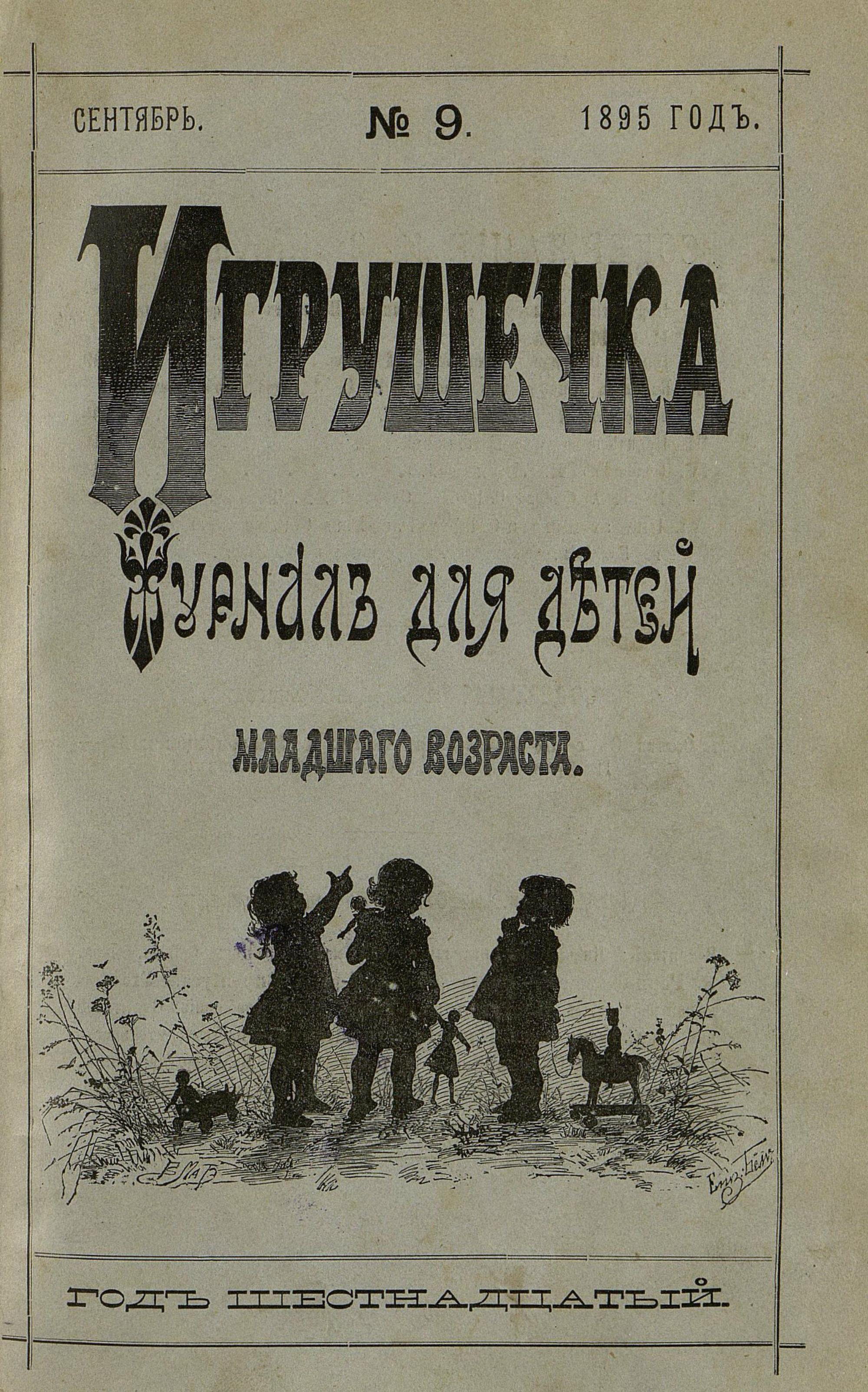 "Игрушечка", журнал для детей, редактор-издатель А.Н.Пешкова-Толиверова